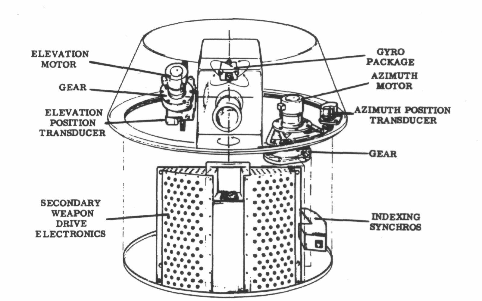 MBT-70 20mm cannon schema.